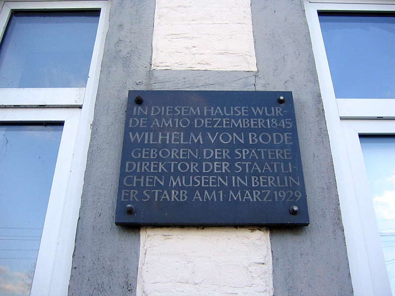 Gedenktafel am Geburtshaus von Wilhelm von Bode in Calvörde, Germany. Bild aufgenommen am 14.01.2007 durch Geisterbob